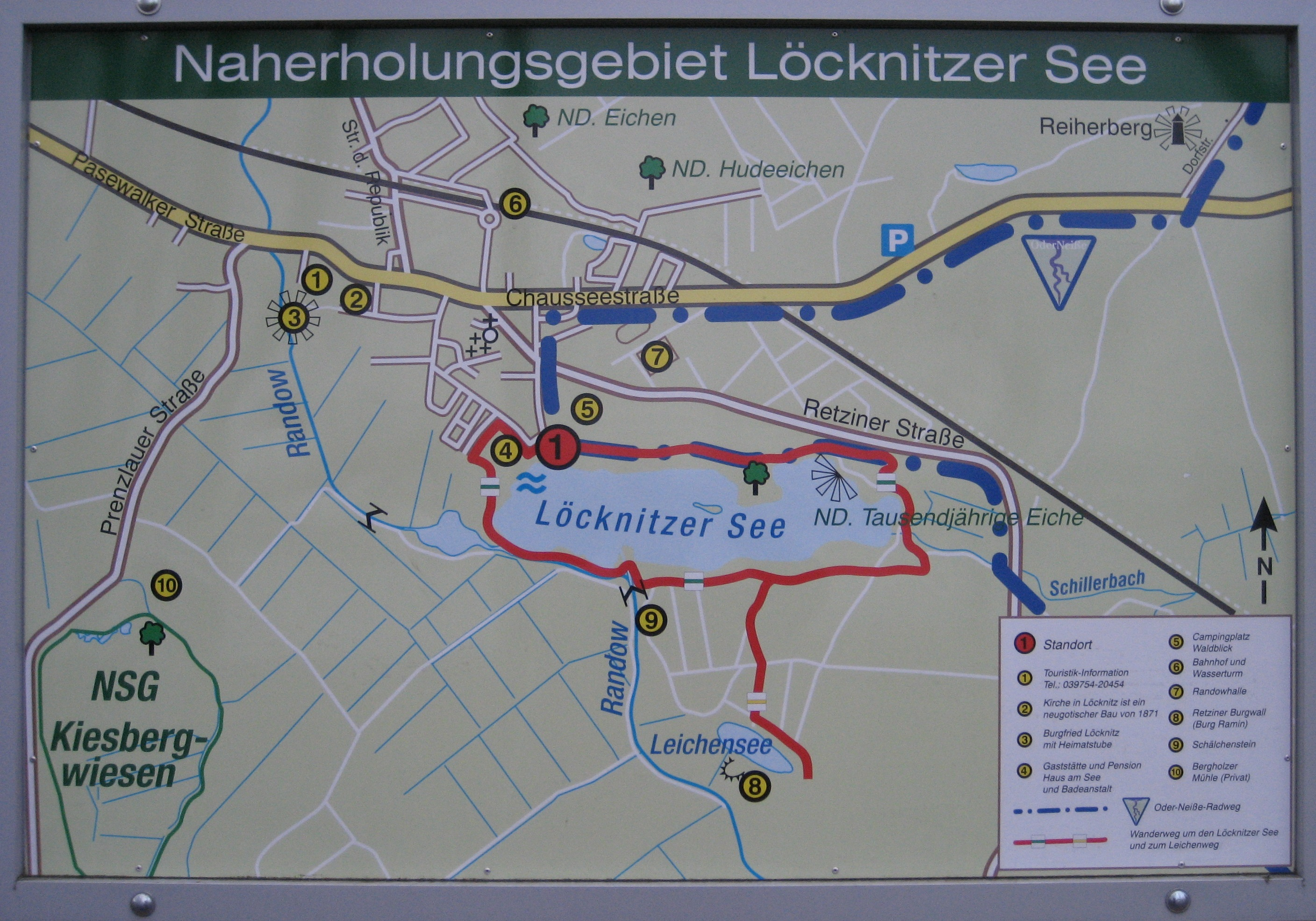 Schild mit einer Übersichtskarte des Naherholungsgebietes Löcknitzer See vor dem "Anglerheim" am Löcknitzer See.